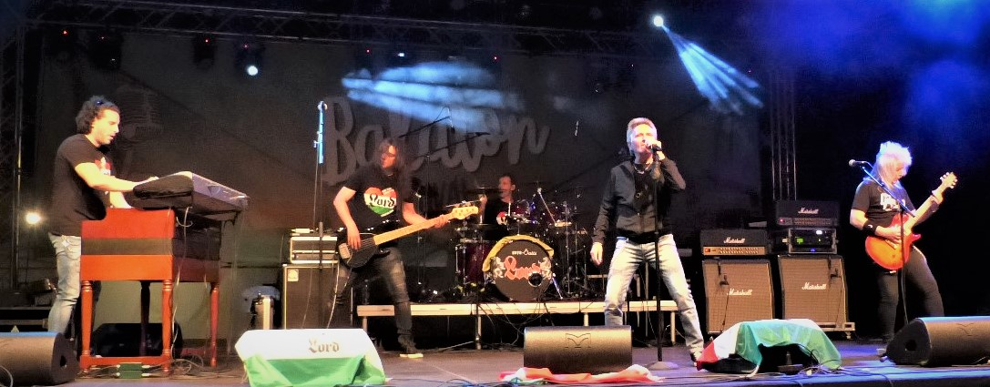 Balaton Fesztivál, 2019. június 28-án, Balatonkenesén. Lord együttes. Felállásː Pohl Mihály, Apró Károly, Beke Márk, Erős Attila.